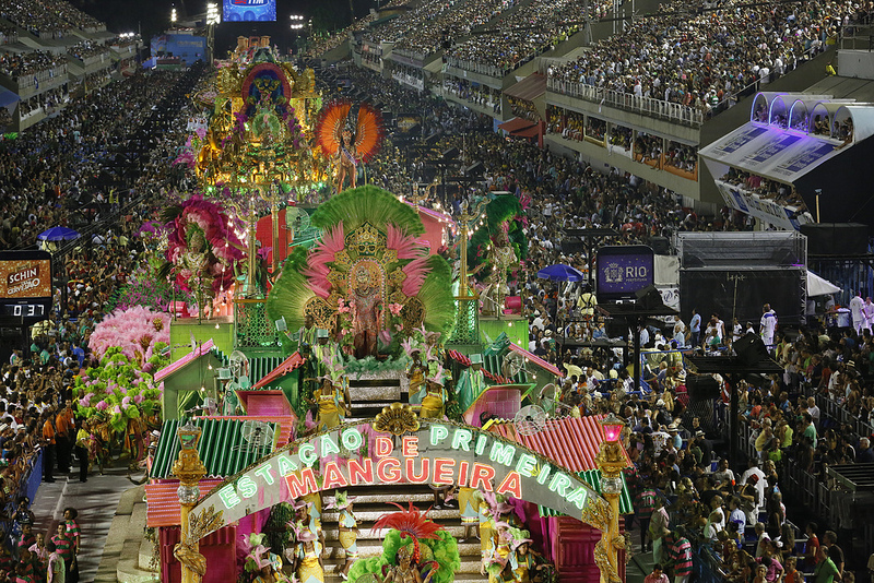 Desfile do Grupo Especial do Rio de Janeiro 2013 - Segundo Dia.